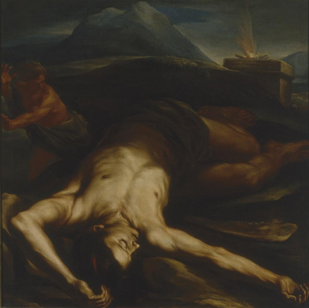 La obra representa el asesinato de Abel por su hermano Caín, siendo ambos hijos de Adán y de Eva.